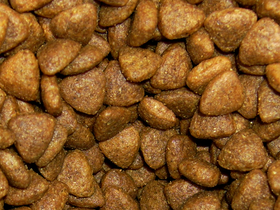 Katzenfutter